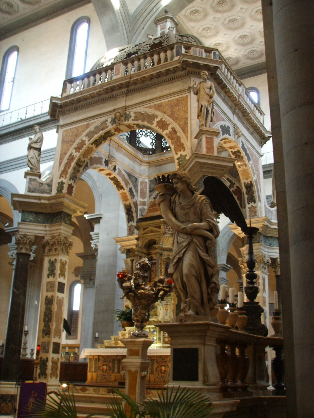 Santo spirito, altare maggiore